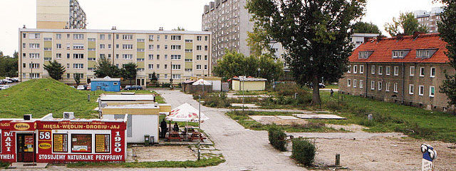 Plac przy ulicy Dunikowskiego w Gorzowie Wlkp.